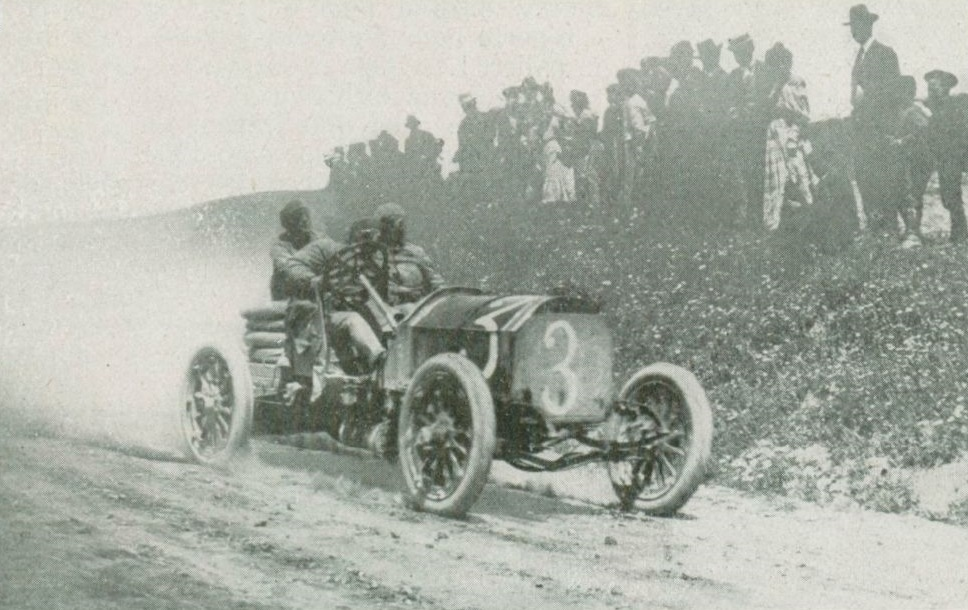 Francesco Ciuppa vainqueur de la Targa Florio en 1909 sur S.P.A. - La Vie au Grand Air du 15 mai 1909, p.312